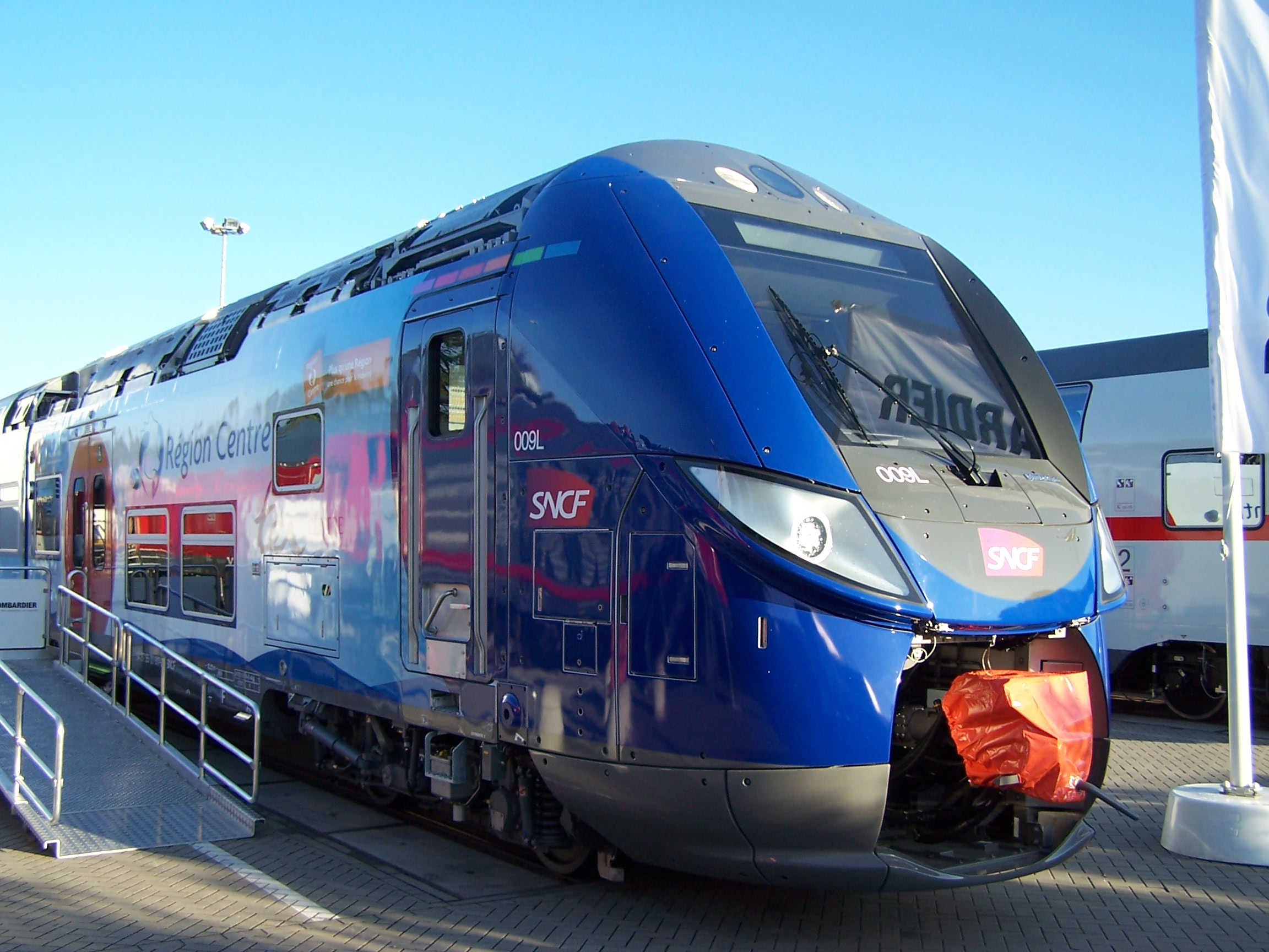 Bombardier OMNEO Z 55517 der SNCF für die Region Centre auf der Innotrans 2014.